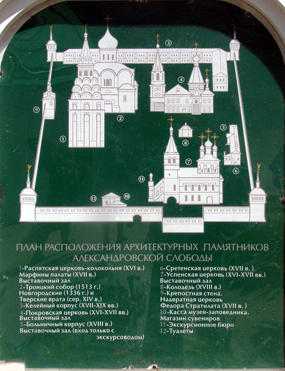 Александровский кремль, план расположения архитектурных памятников